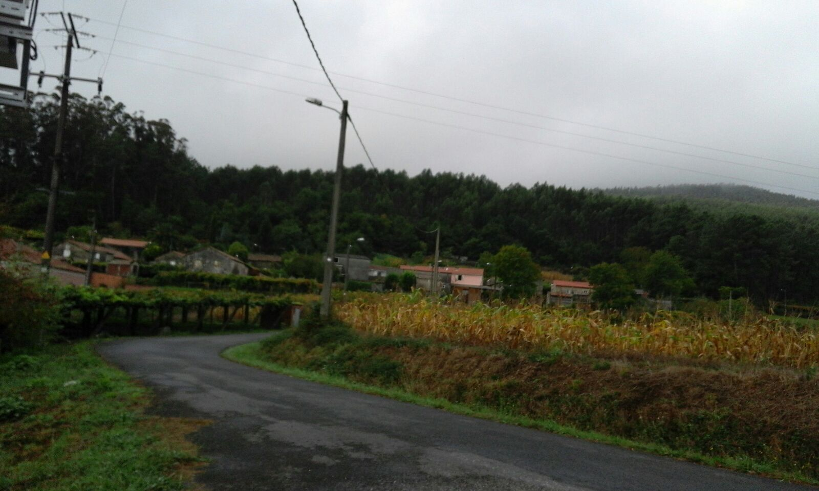 Aldea de Reibó